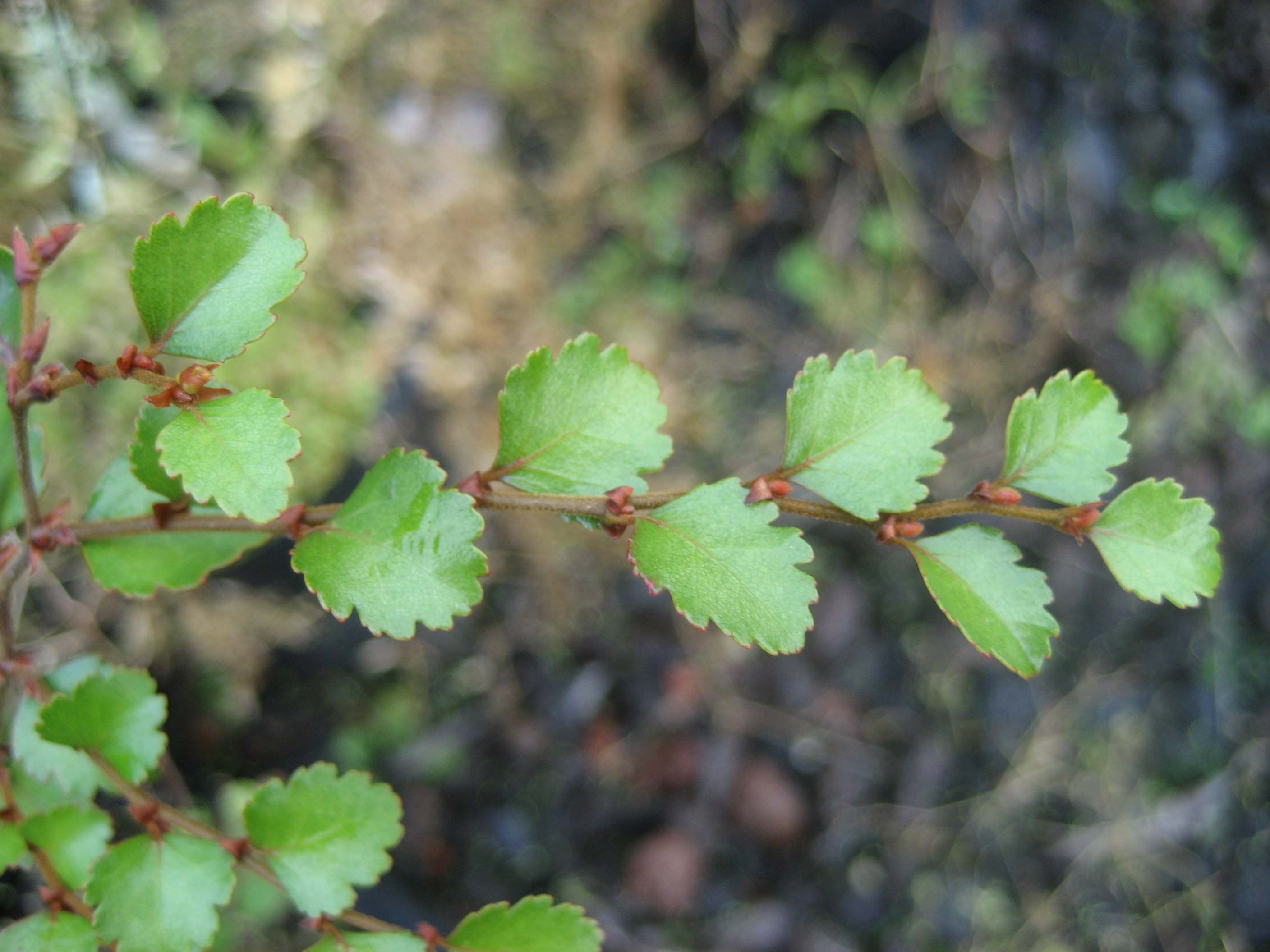 Silver beech Nothofagus menziesii, foliage